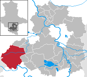 Querfurt in Saxony-Anhalt - Saalekreis